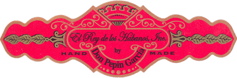 Scan of cigar band, El Rey de los Habanos brand